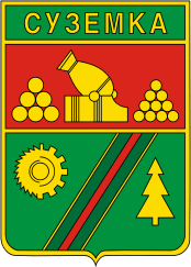 Герб Суземки